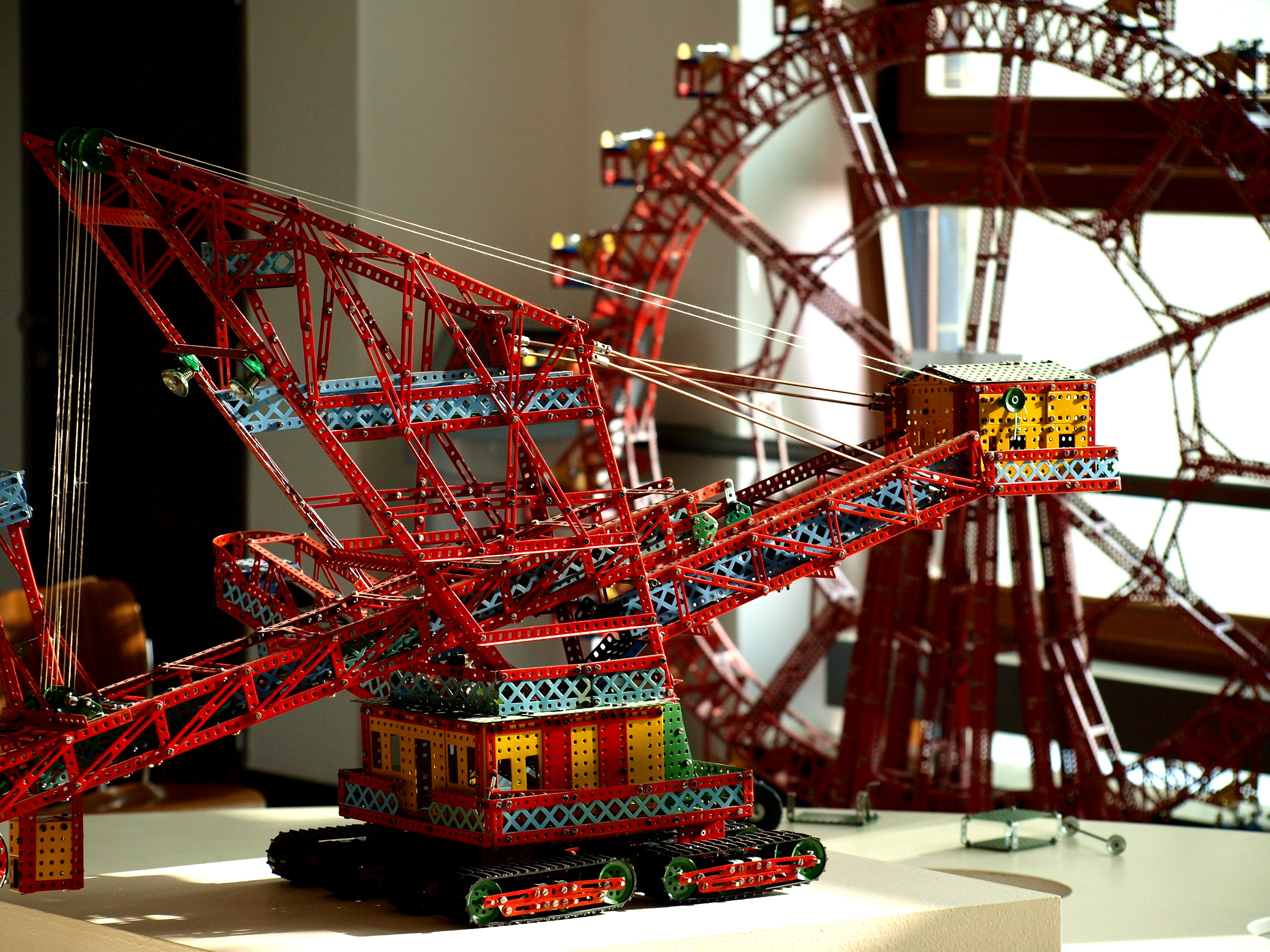 Národní technické muzeum v Praze